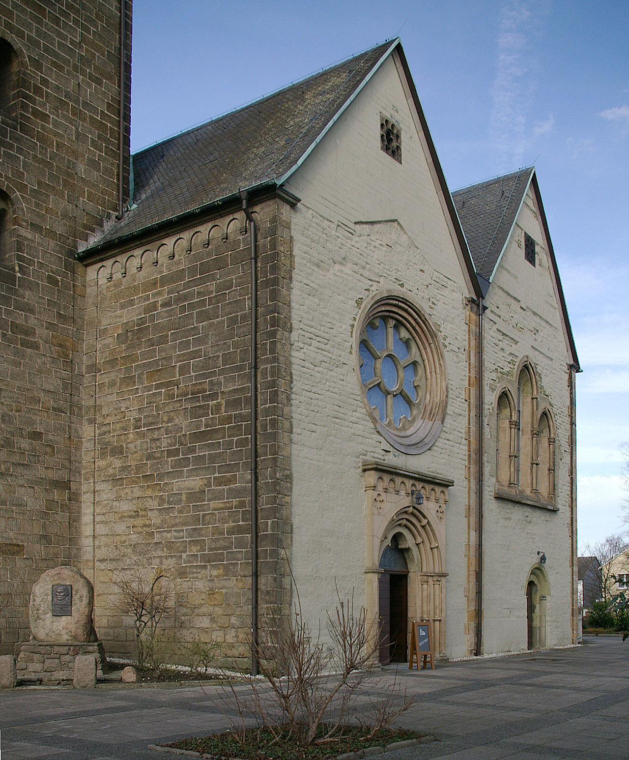 Margaretenkirche Methler, Nordrhein-Westfalen. Rose über dem Haupteingang. Der stark verwitterte Grünsandstein mußte durch einen Putz geschützt werden.